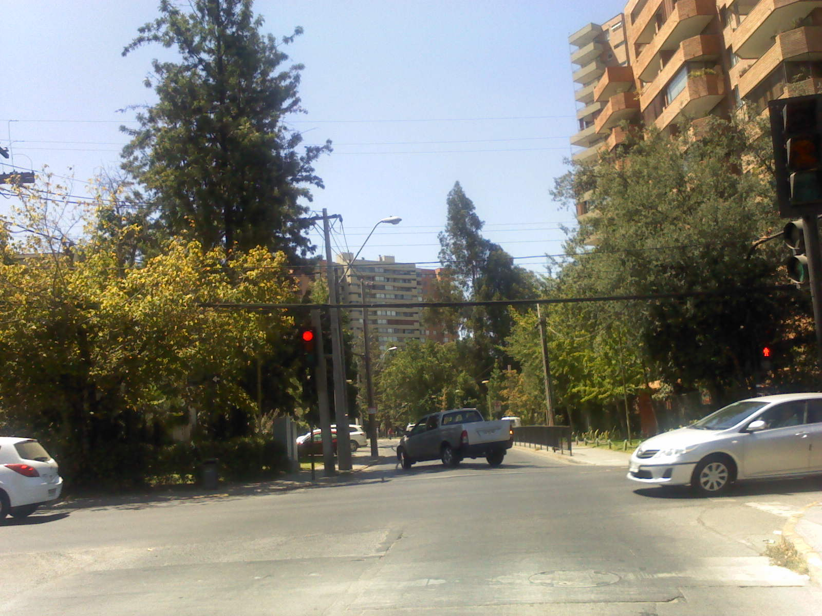 Martin de Zamora con Americo Vespucio, Las Condes, Santiago de Chile